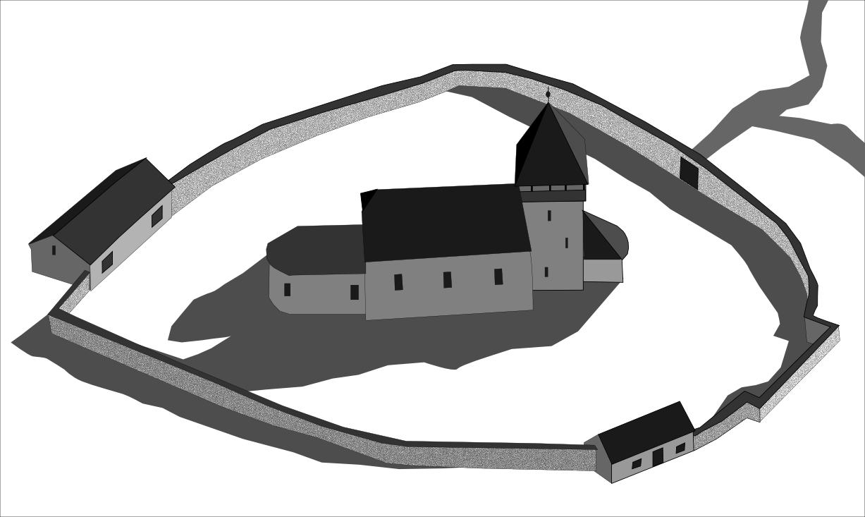 Biserica fortificata din Bradu